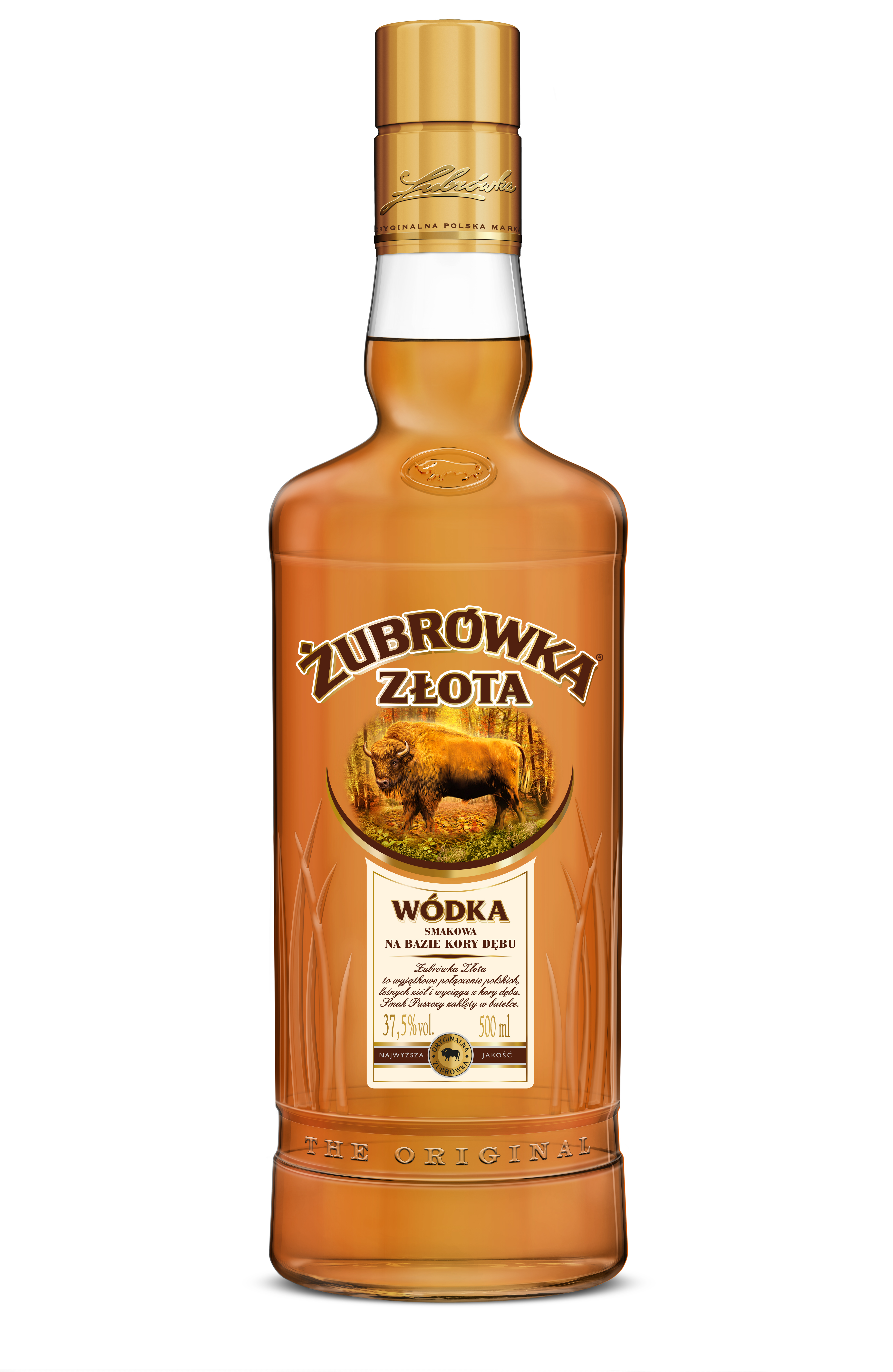 Najnowsza odmiana wódki Żubrówka.